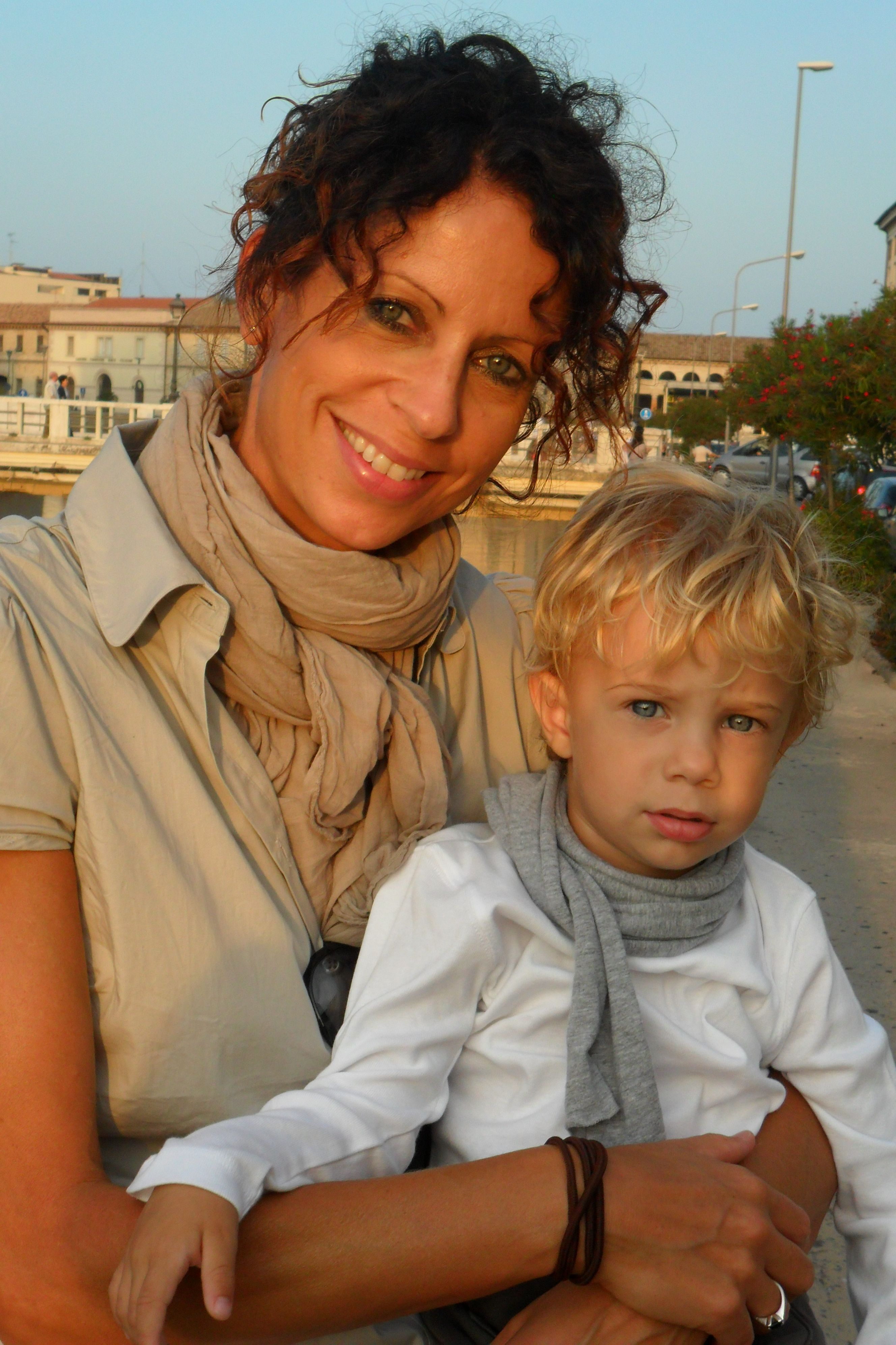 Voormalig volleybal speelster